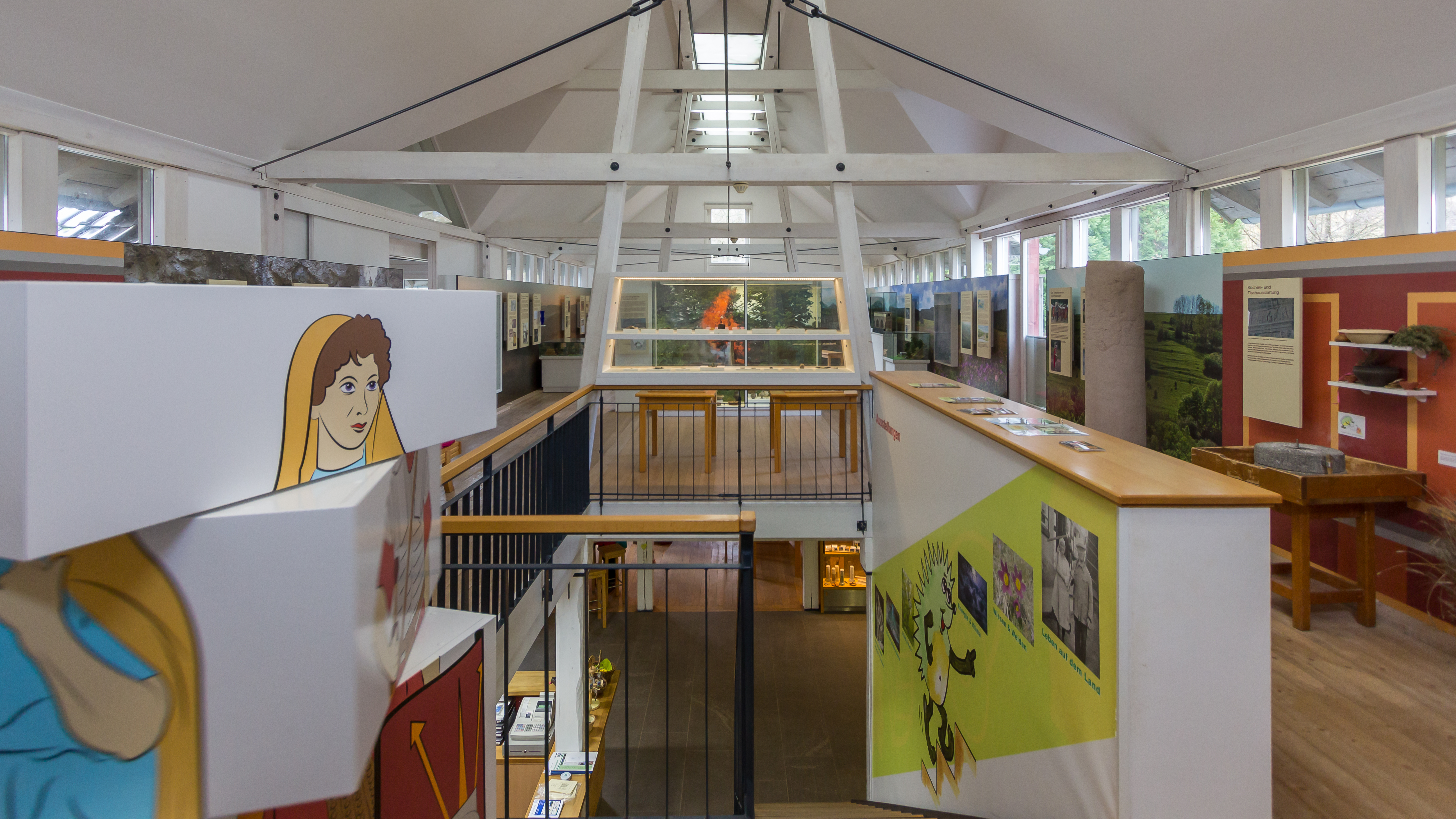 Naturzentrum Eifel